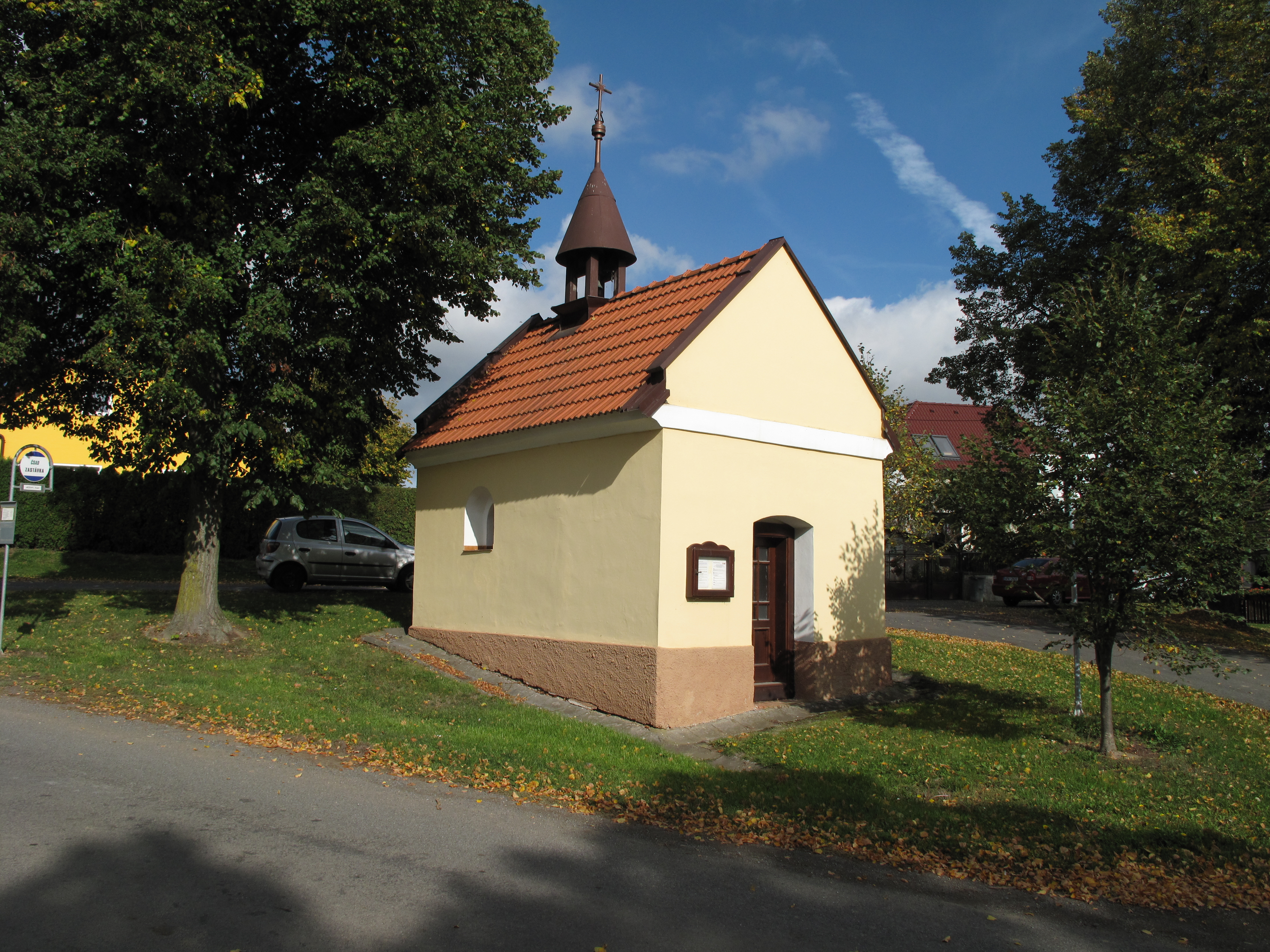 Trnčí. Okres Klatovy, Česká republika.